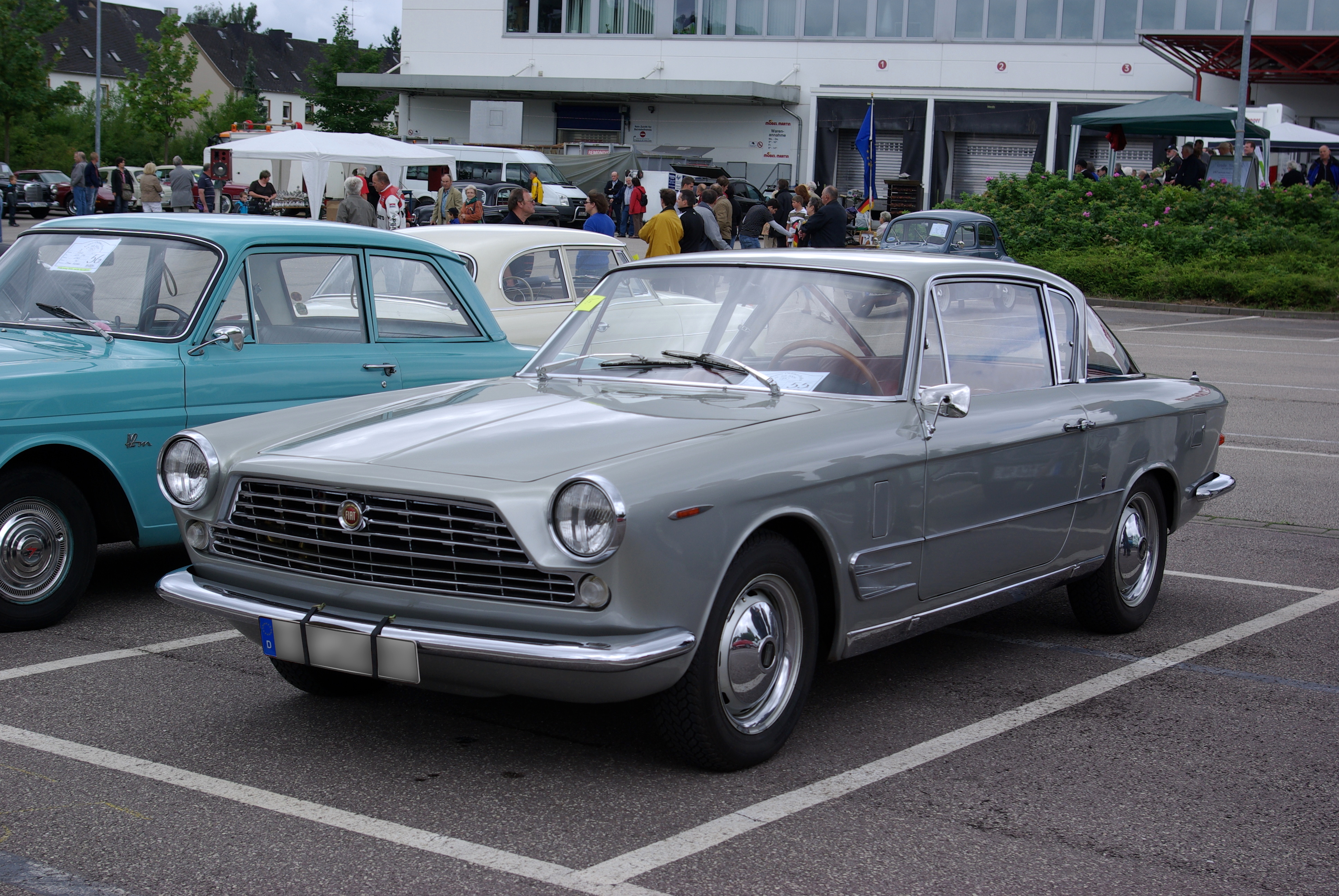 Fiat 2300 S Coupé, Baujahr 1965, 136 PS , aufgenommen bei / photographed at "25. Internationales Konzer Oldtimer-Treffen", 19. Juli 2009